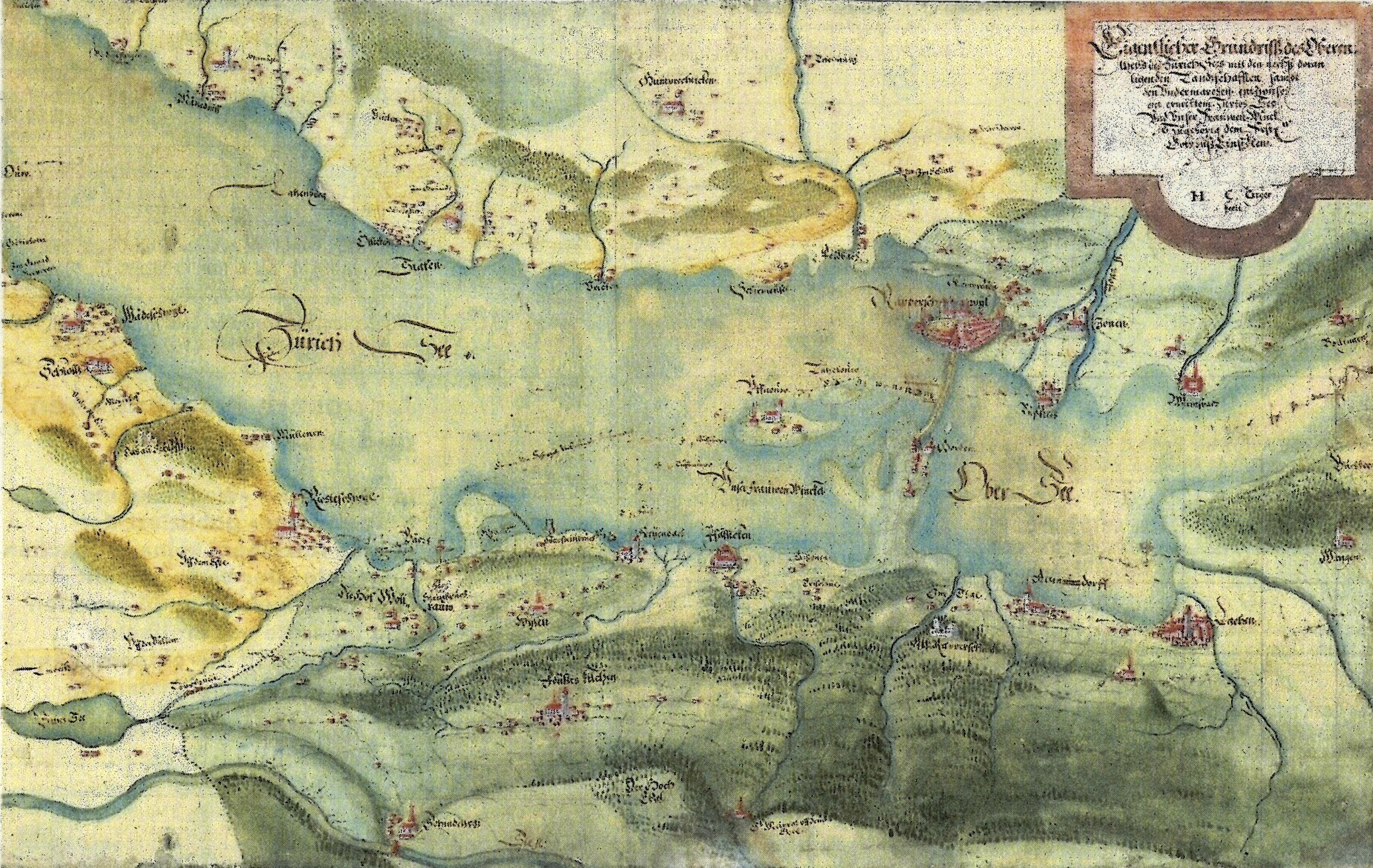 Historische Zürichseekarte Originalbeschreibung: «Eigentlicher Grundriss des oberen Theils des Zurich Sees mit den nechst doran ligenden Landtschafften sambt den Undermarchen entzwüschen ermeltem Zürich See und unser Frauwen-Winckel zugehörig dem Frstl.n Gotshuss Einsidlen» «Zum Grenzstreit zwischen Zürich und Schwyz 1635–1643; auf Holztafel aufgezogen und gerahmt» «Format: 1 Manuskriptkarte: mehrfarbig, Bleistift, Tusche und Aquarell; 35 × 57 cm» «Karteninformationen: [Ca. 1:30 800]; E 8°38'–E 8°54'/N 47°16'–N 47°10'»